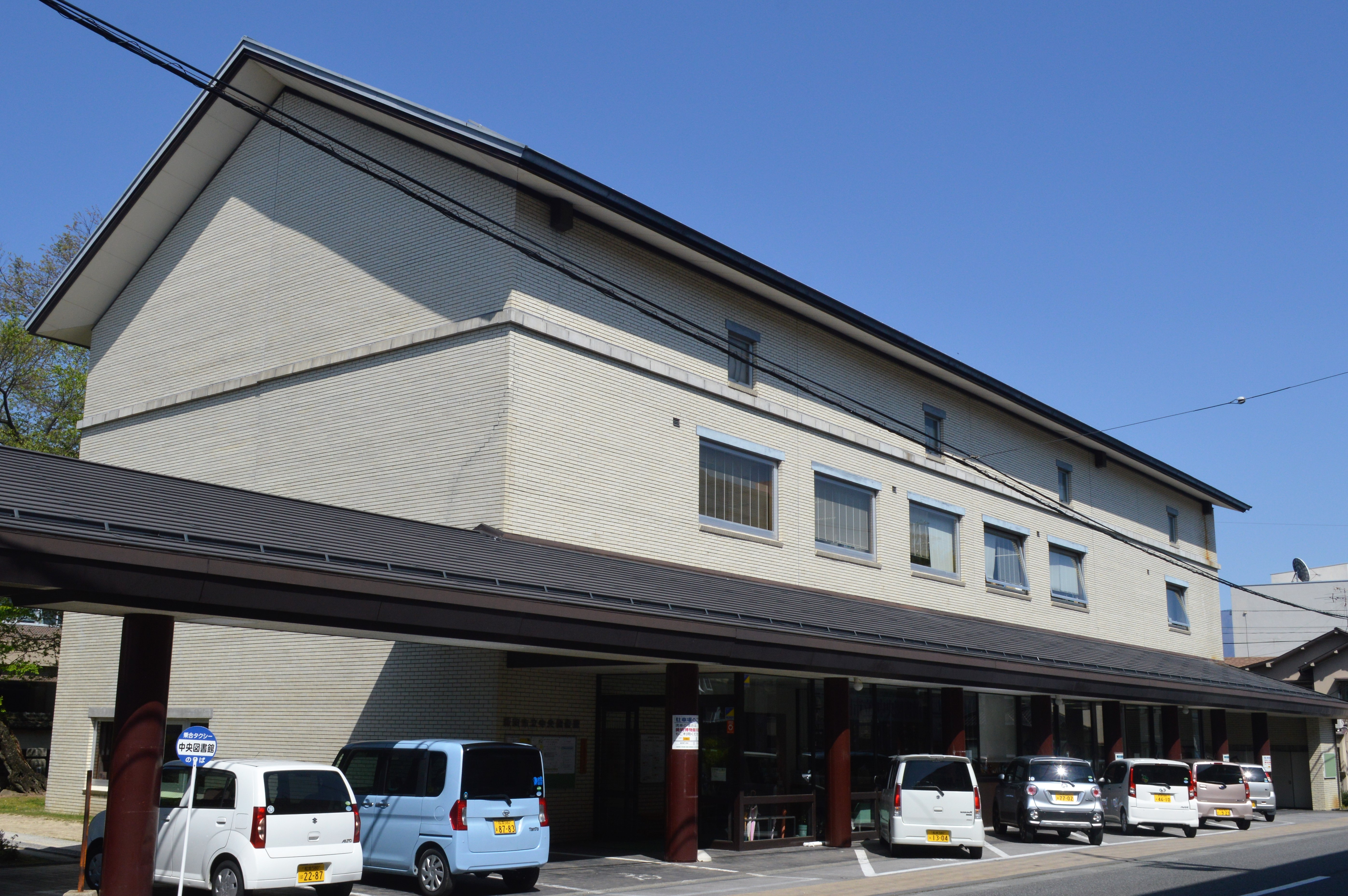 長野県飯田市の飯田市立中央図書館。